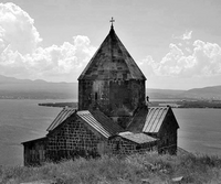 സെവാൻ തടാകതീരത്ത് എ.ഡി. ഒൻപതാം ശതകത്തിൽ നിർമ്മിച്ച അപ്പോസ്തല ദേവാലയം